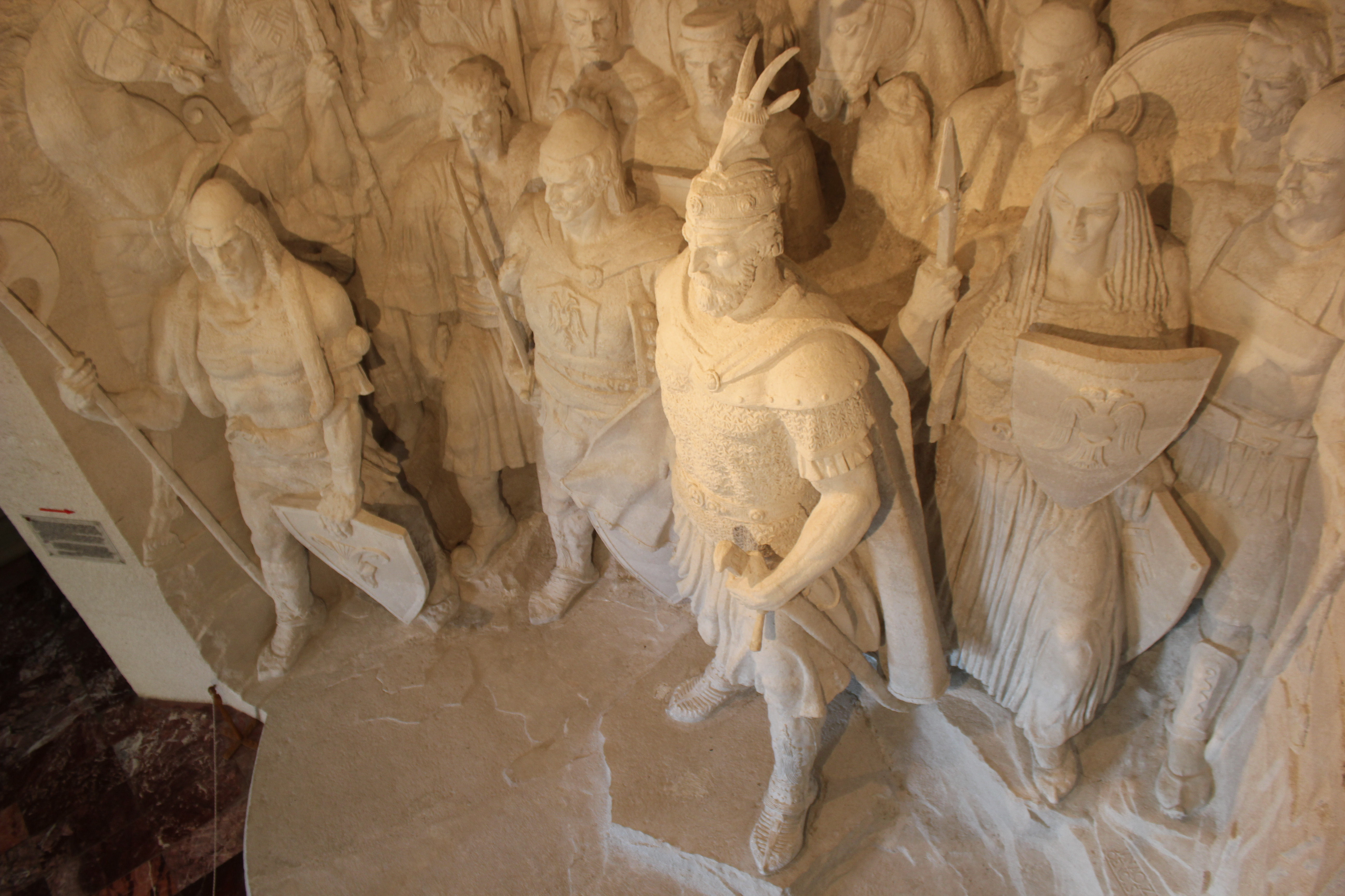 Kalaja e Krujes